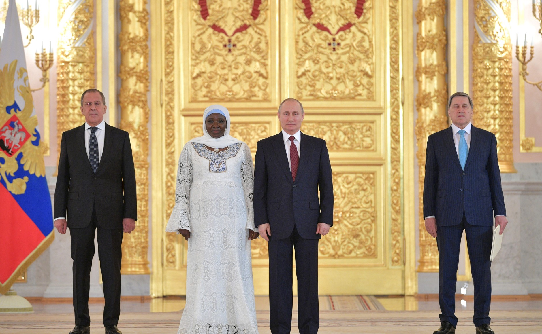 В Александровском зале Большого Кремлёвского дворца Владимир Путин принял верительные грамоты у послов ряда иностранных государств. На церемонии вручения верительных грамот. С Чрезвычайным и Полномочным Послом Республики Гамбии в Российской Федерации Джайнабой Ба.